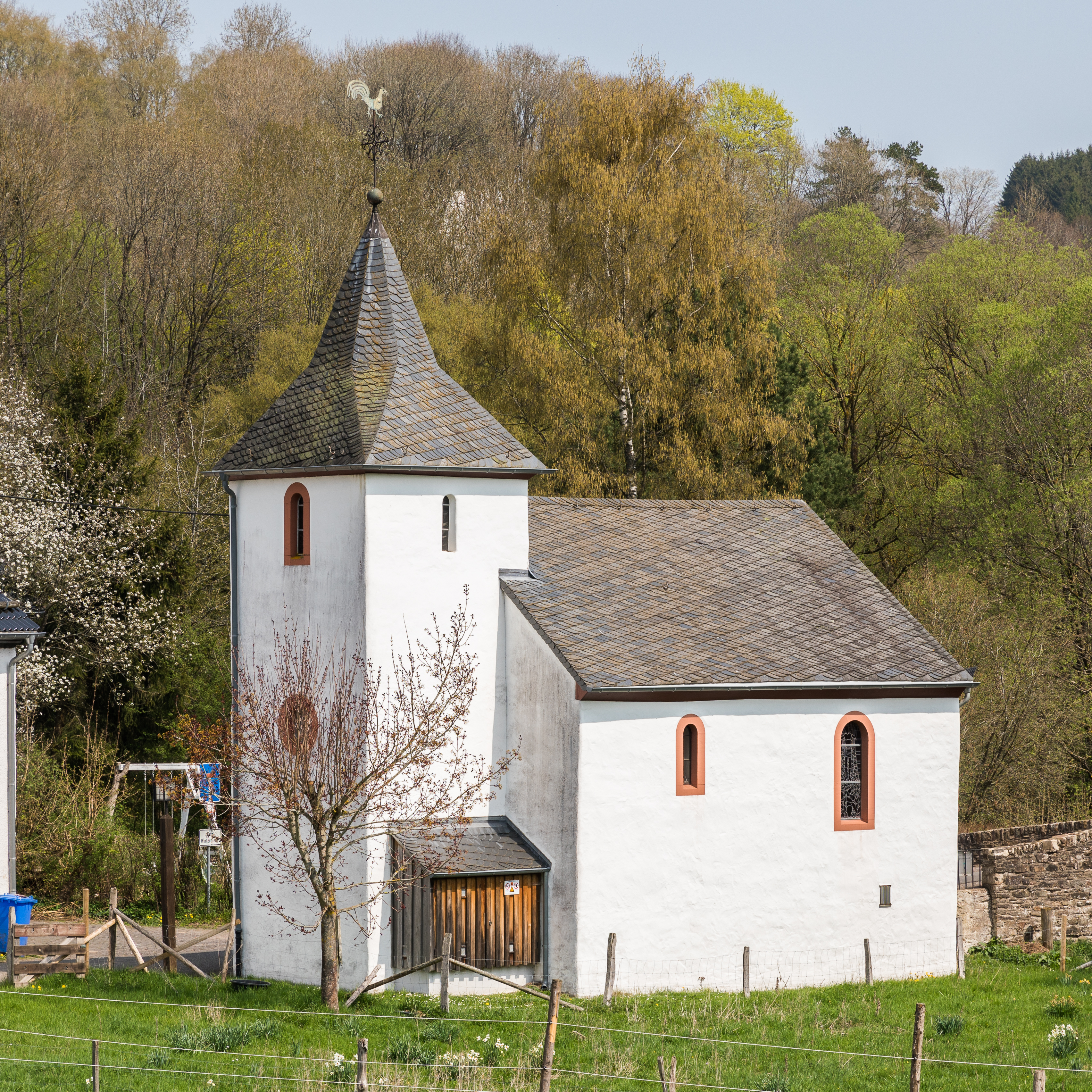 Brigida-Kapelle, Kronenburgerhütte This image shows a heritage building in Germany, located in the North Rhine-Westphalian city Dahlem (Nordeifel) (no. 68).